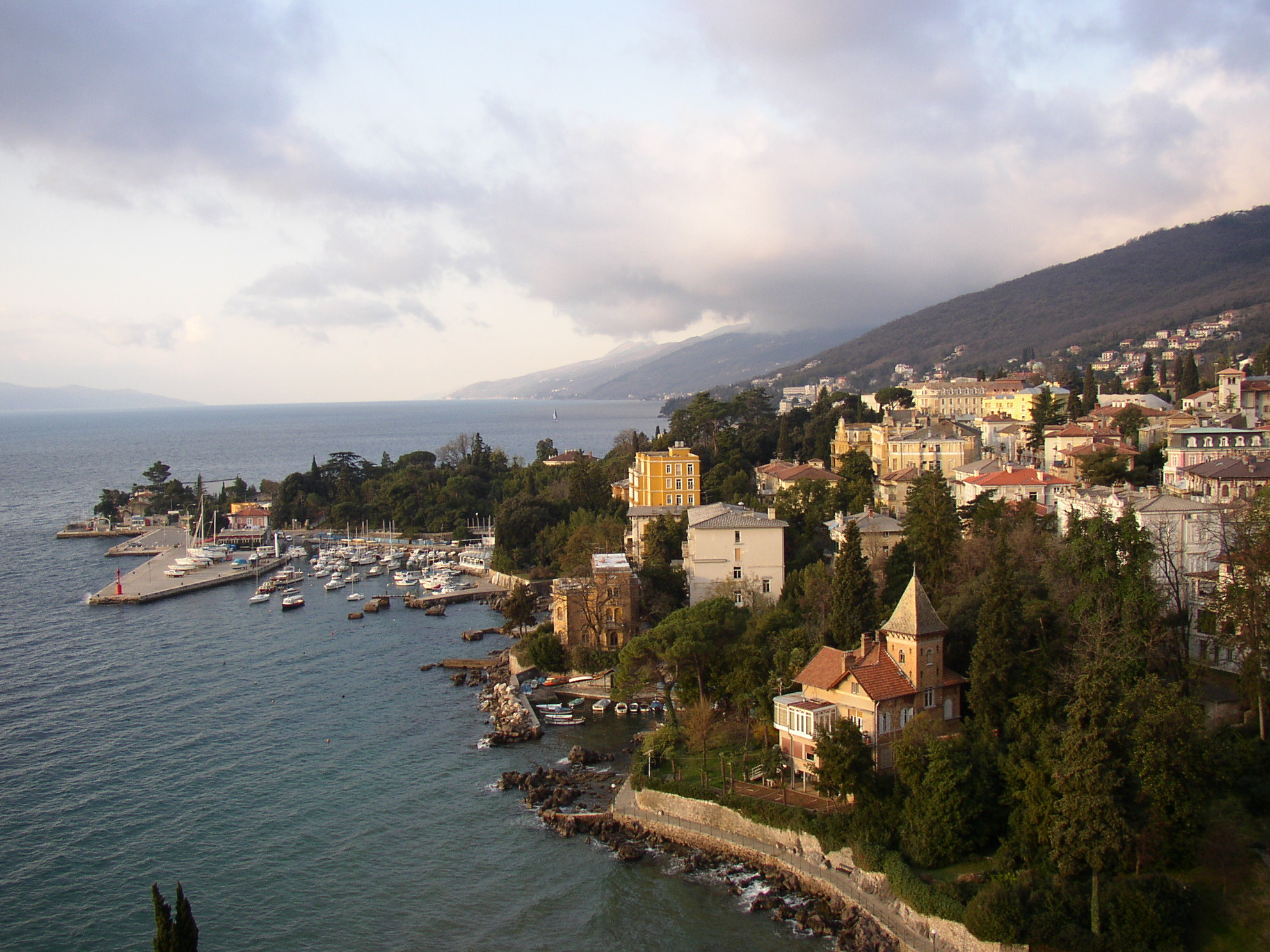 Opatija